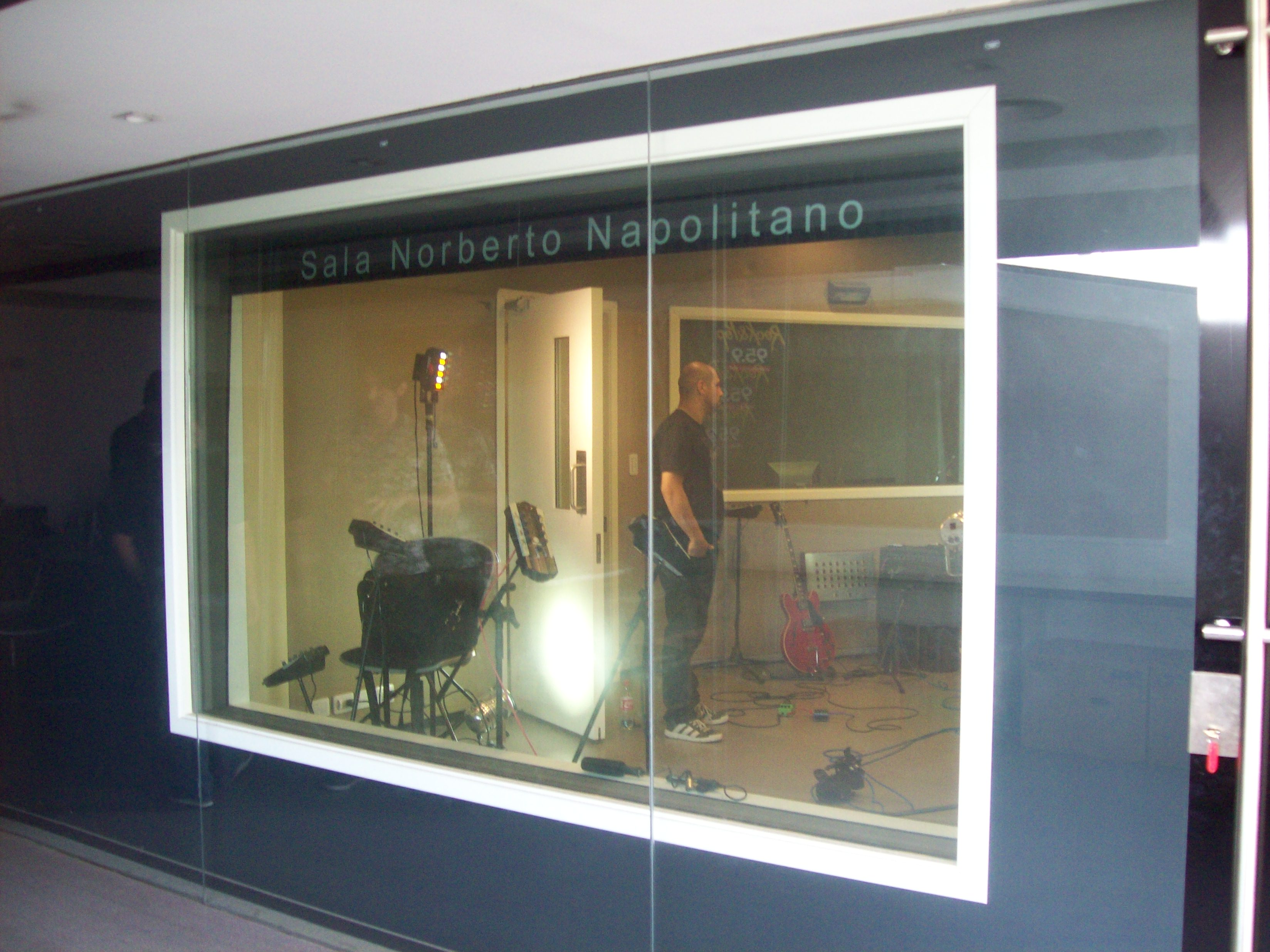 Claudio Gabis, Frans Banfield, Gustavo Giannini ensayando en la sala Norberto Napolitano en la Rock & Pop.